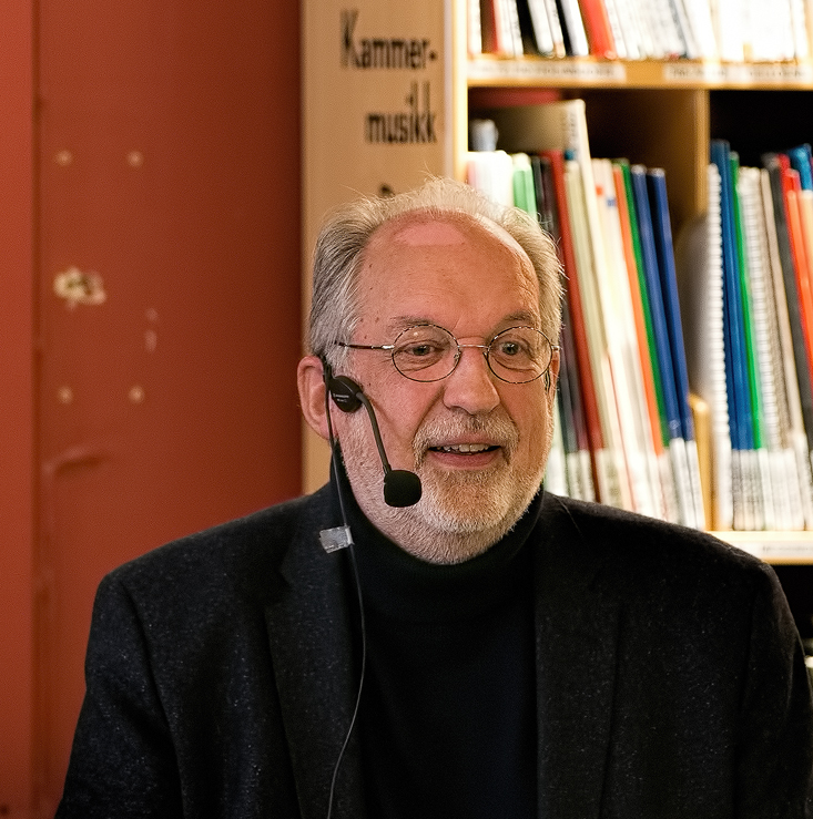 10. mars 2016